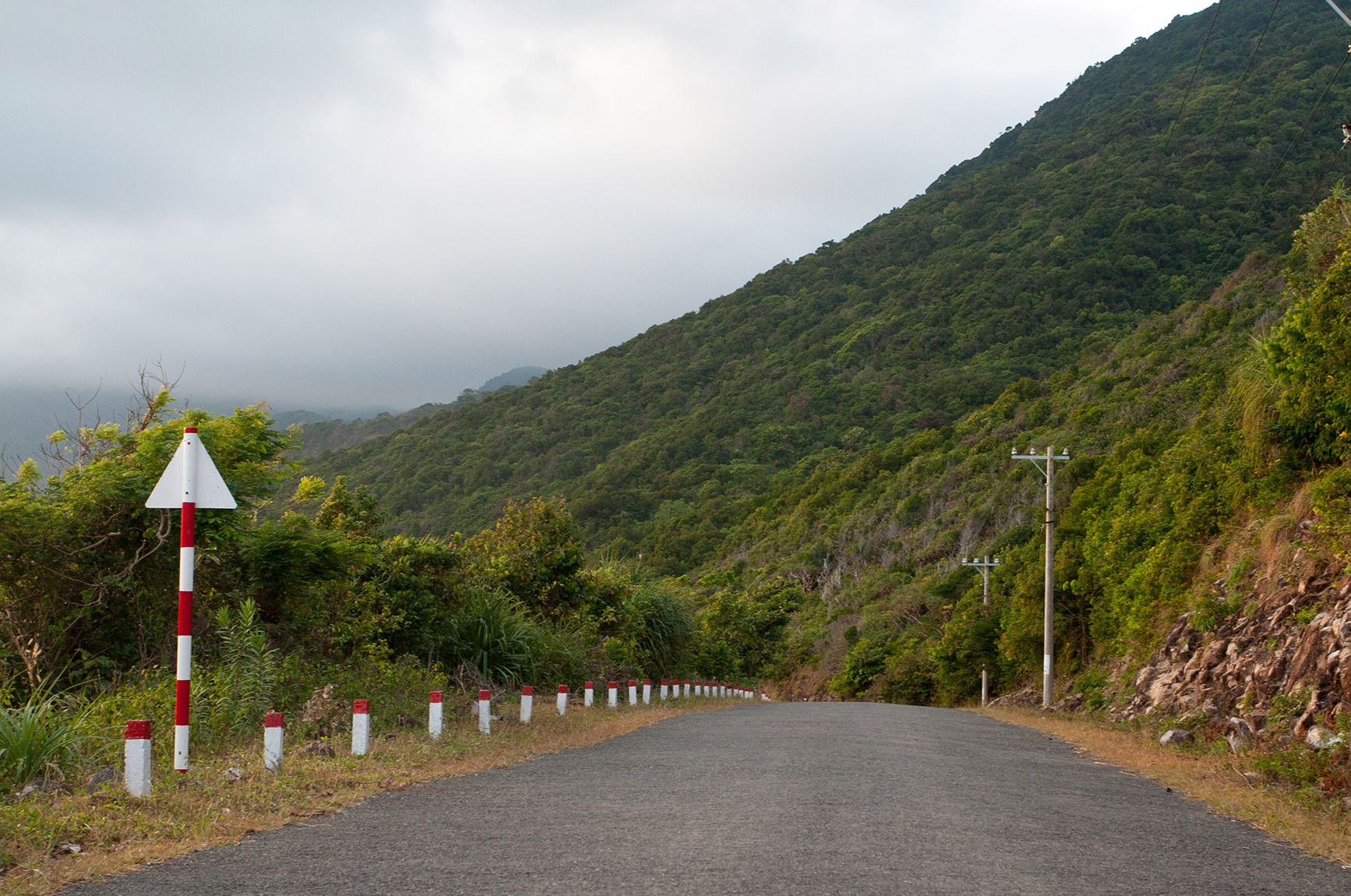 Cỏ Ống, Côn Đảo